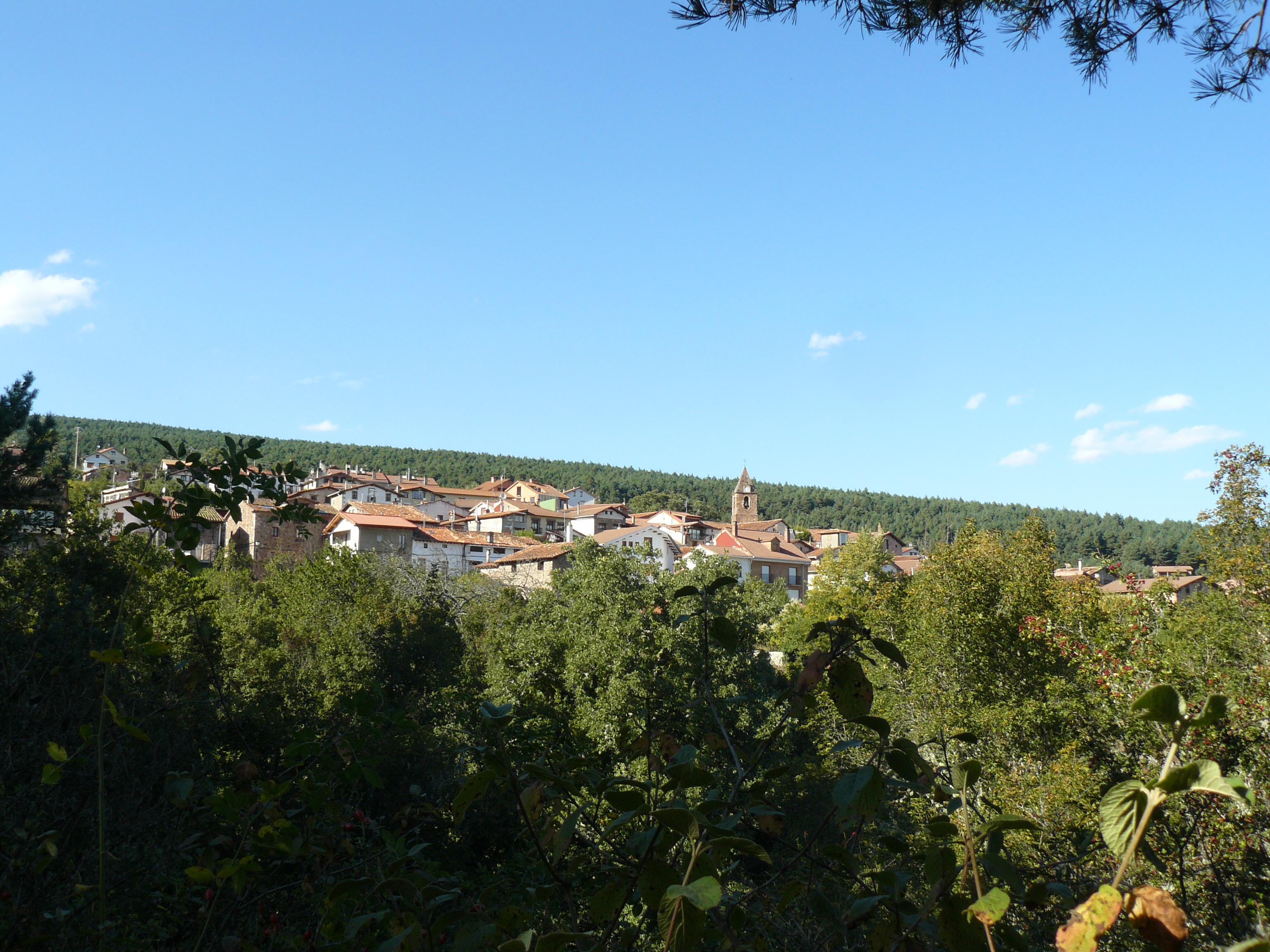 El Rasillo, La Rioja.